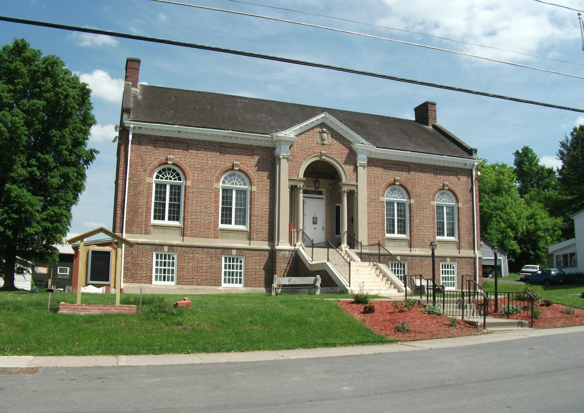 Norfolk, New York